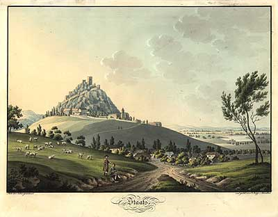 Staatz im Bezirk Mistelbach. Quelle: Historisch malerische Darstellungen von Oesterreich, Wien 1814-24 Autor: Anton Köpp von Felsenthal (1766-1826)